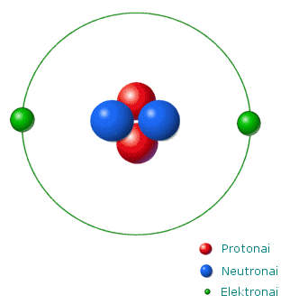 Helio atomas (savadarbis)